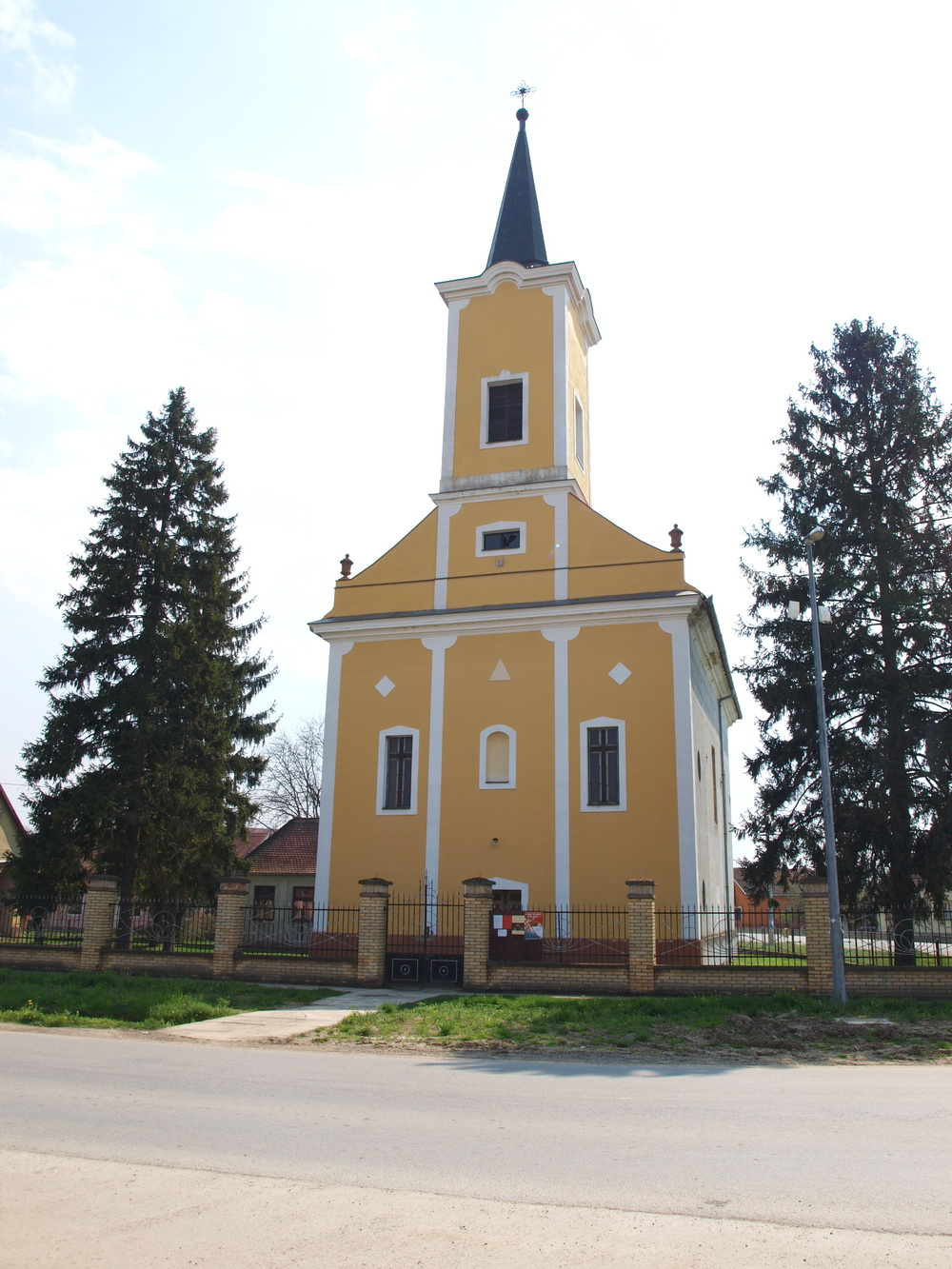 Crkva u selu Oprisavci, Brodsko-posavska županija.